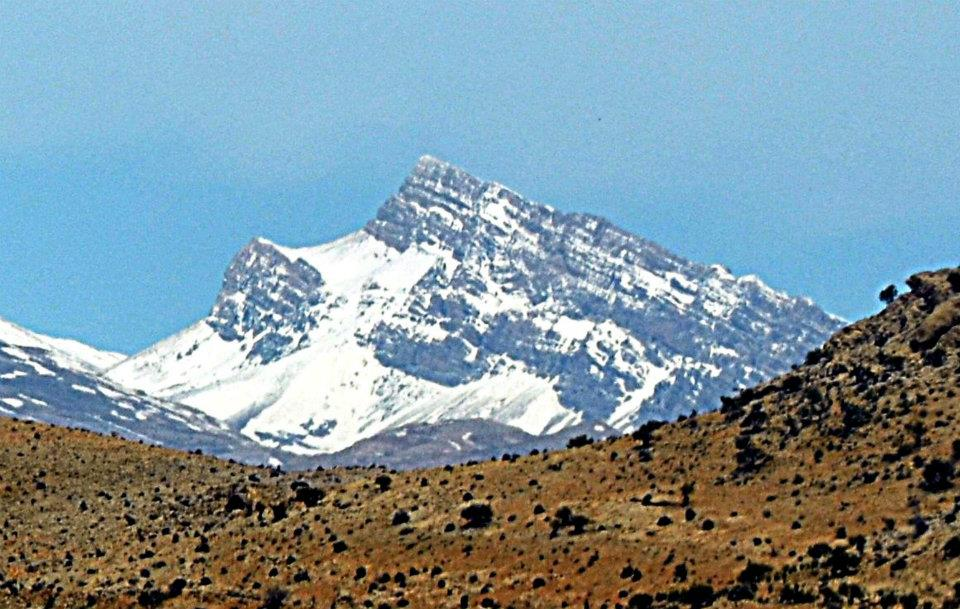 نماي قله 3708 متري رنج از جاده شيراز-اردكان در اوايل بهار